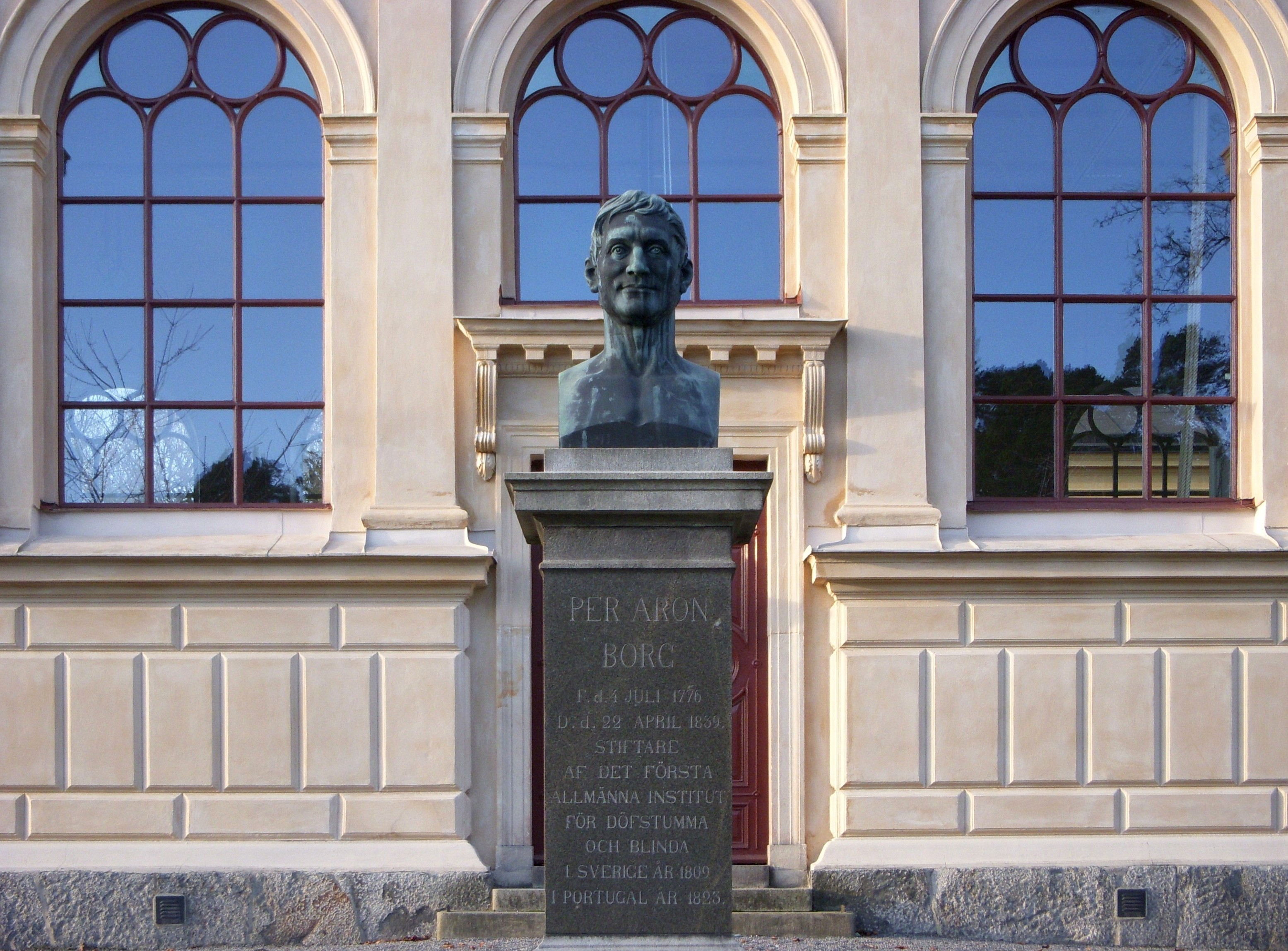 Gymnastikhuset vid Manillaskolan med byst av Frithiof Kjellberg visande Pär Aron Borg